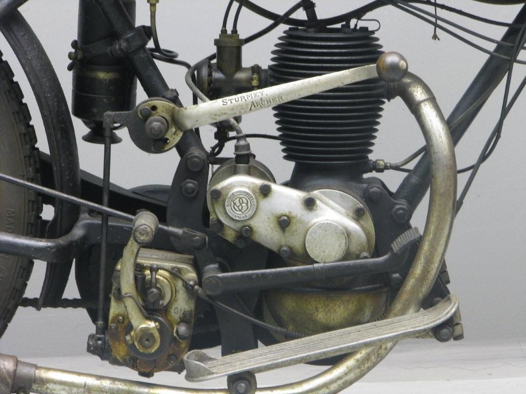 Barr & Stroud 350 cc sleeve valve engine from the 1920s